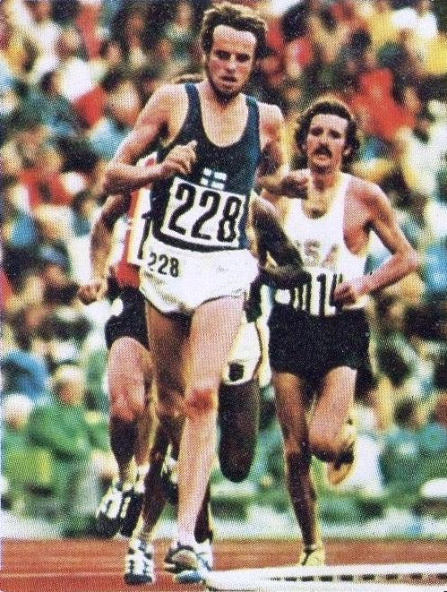 CAMPIONI dello SPORT 1973/74-Figurina n.3- VIREN - FINLANDIA -ATL.LEGGERA-Rec (10k at 1972 Olympics)